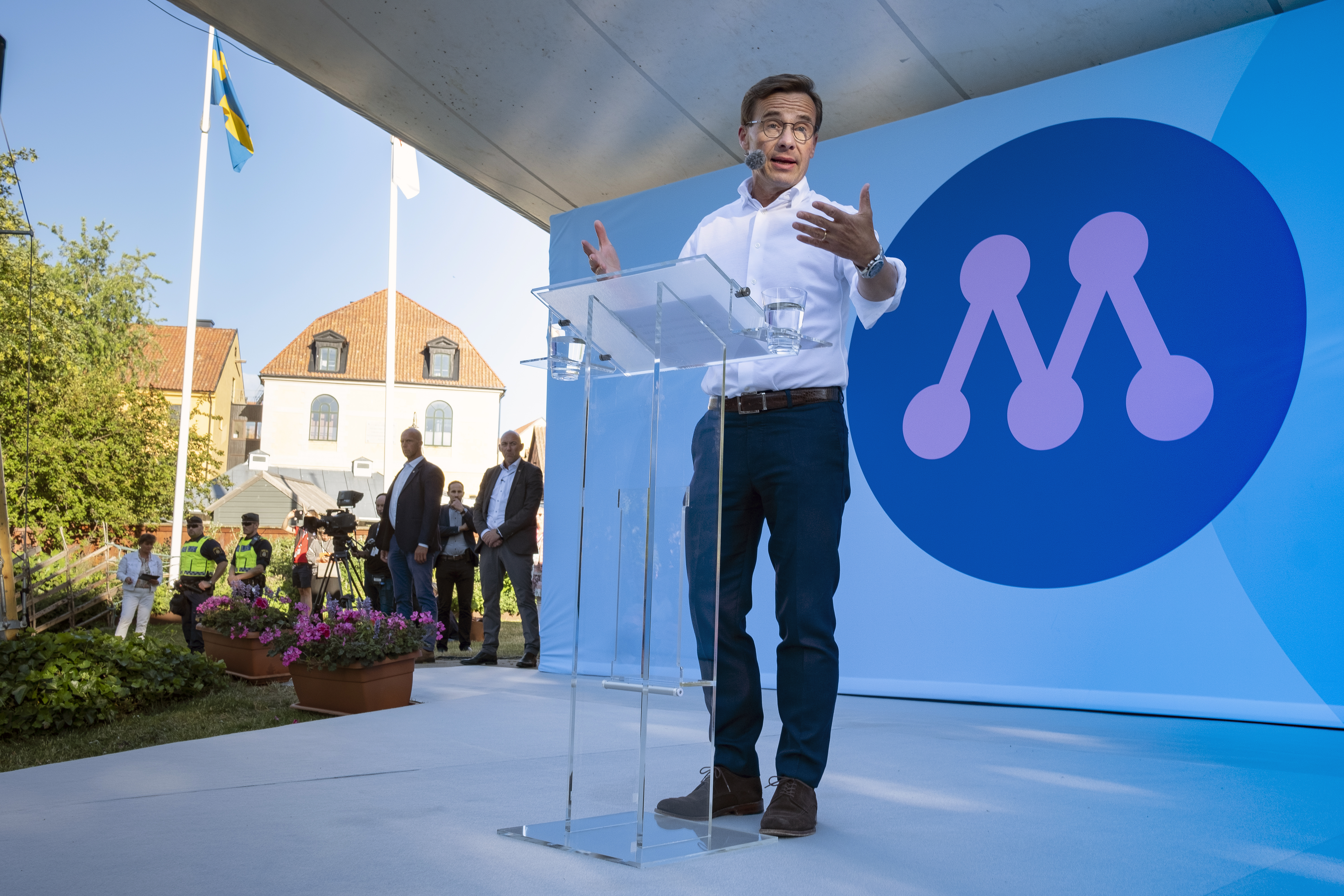 20190701 Almedalsveckan i Visby på Gotland. Moderatledaren Ulf Kristersson talar i Almedalen. Photo: News Øresund - Johan Wessman © News Øresund - Johan Wessman (CC BY 3.0). Detta verk av News Øresund är licensierat under en Creative Commons Erkännande 3.0 Unported-licens (CC BY 3.0). Bilden får fritt publiceras under förutsättning att källa anges. .The picture can be used freely under the prerequisite that the source is given. News Øresund, Malmö, Sweden News Øresund är en oberoende regional nyhetsbyrå som är en del av det oberoende dansk-svenska kunskapscentrat Øresundsinstituttet.. .